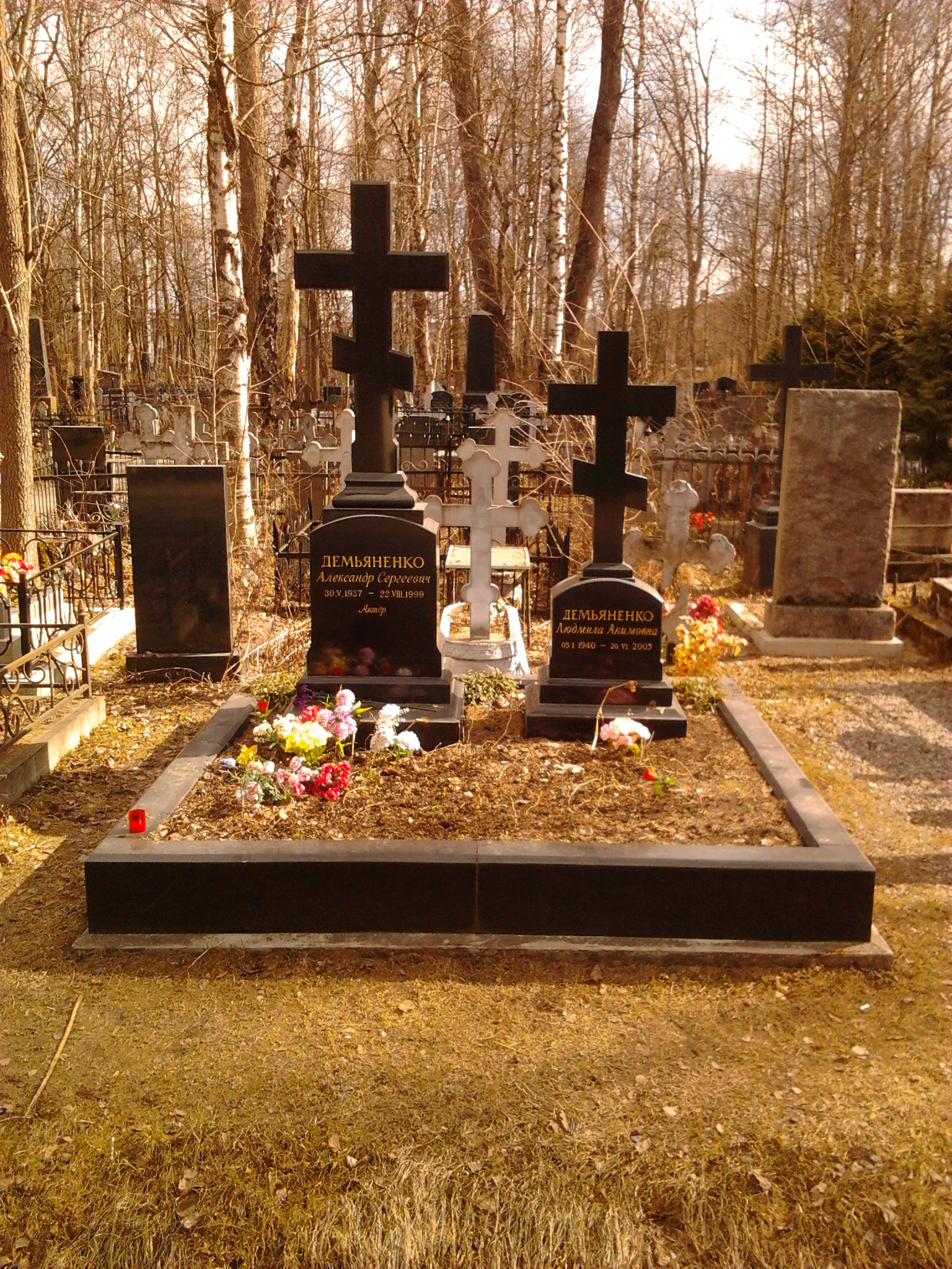 Надгробия А. С. Демьяненко и его супруги на Серафимовском кладбище Санкт-Петербурга.